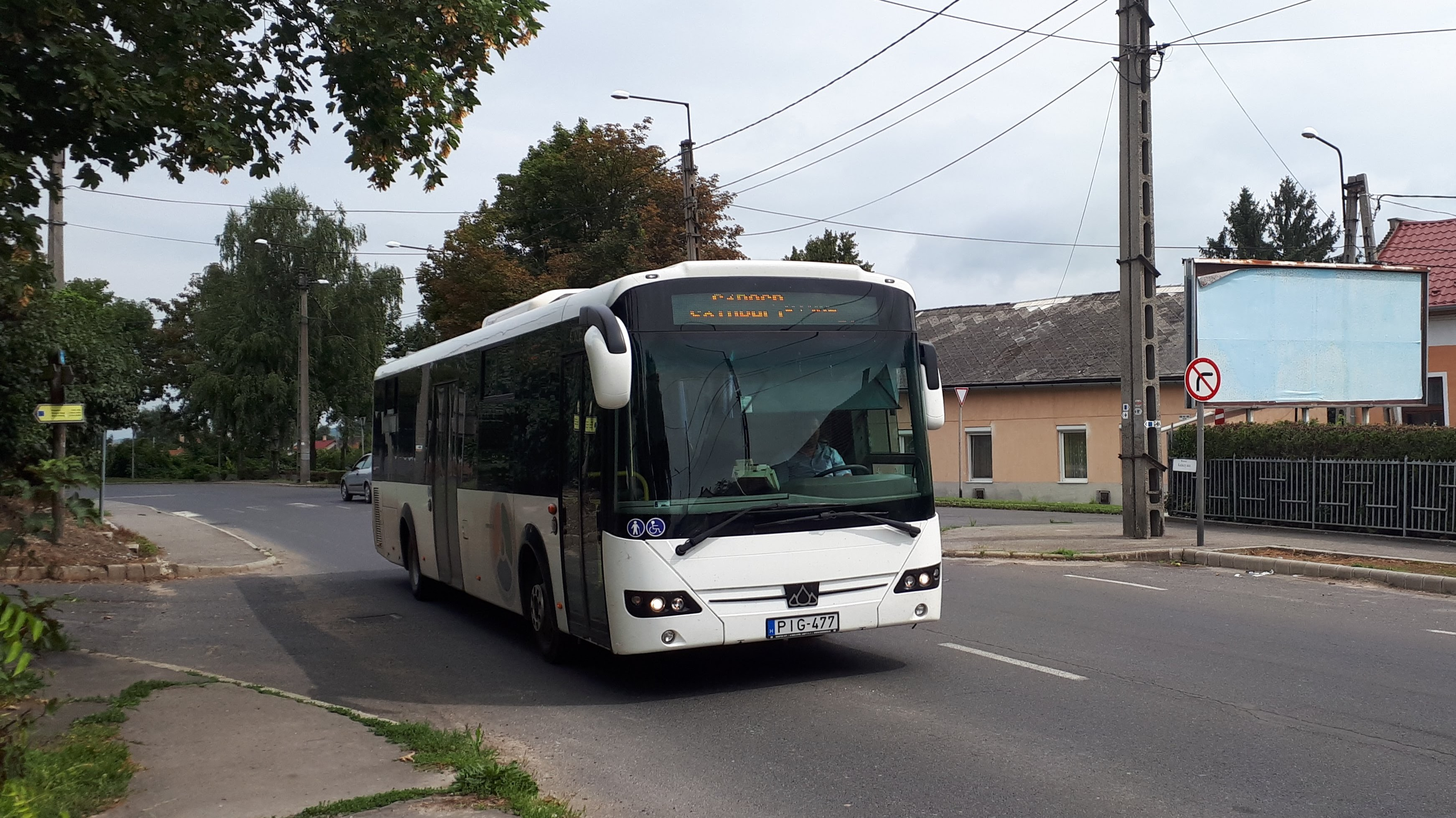 Az ÉMKK PIG-477 rendszámú Credo Econell 12 típusú busza Sátoraljaújhelyen (a Pincekert közelében), a 3870-es helyközi járaton.